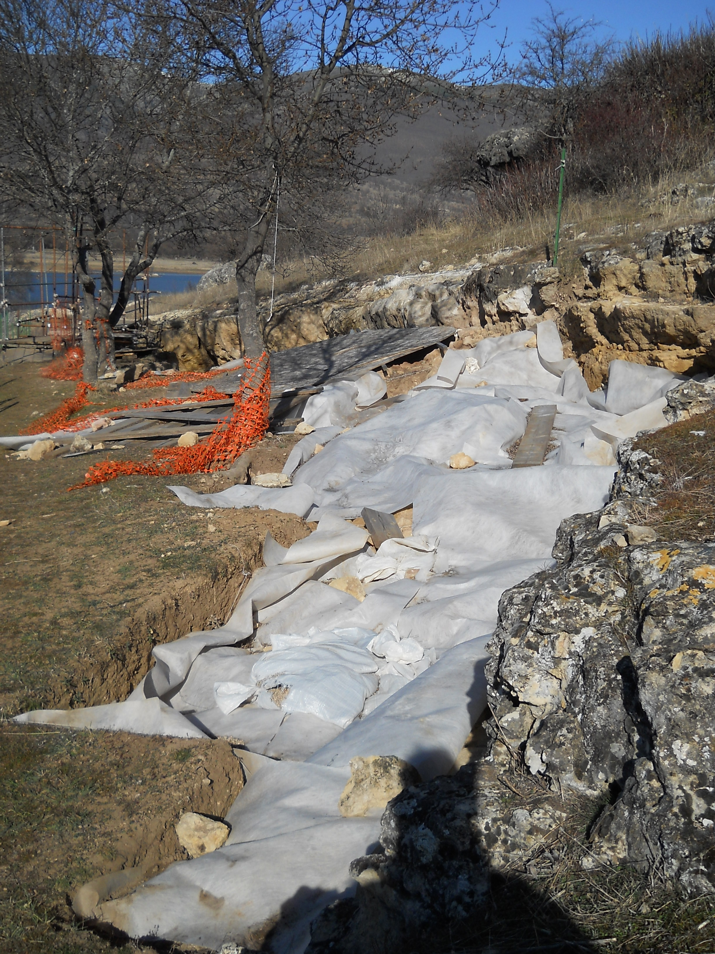 Abrigo de Navalmaillo, yacimiento arqueológico de los Calveros, Pinilla del Valle, Madrid, España